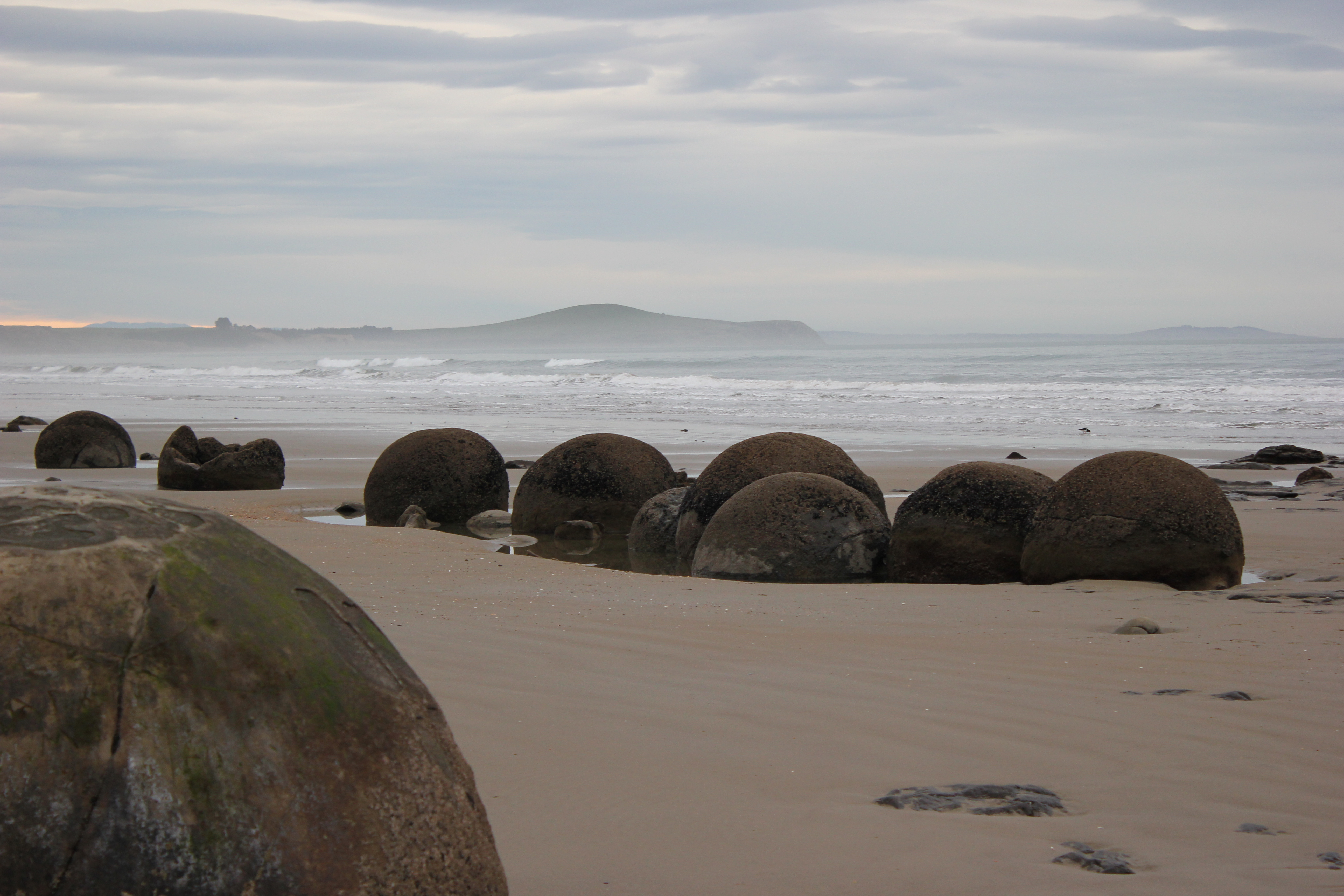 Beach Balls (Moeraki Boulders, NZ)